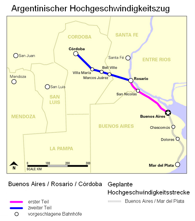 Argentinischer Hochgeschwindigkeitszug Cobra